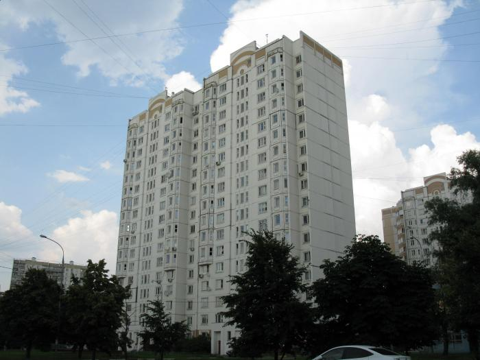 Улица Плеханова, 29 корп.1. Перово. Москва.